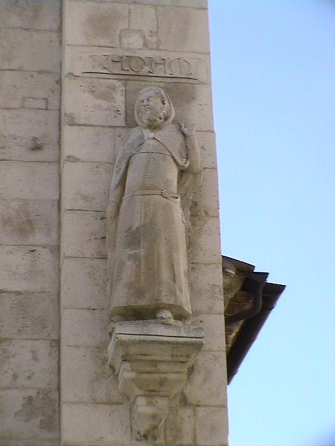 Persico Tony Ernesto